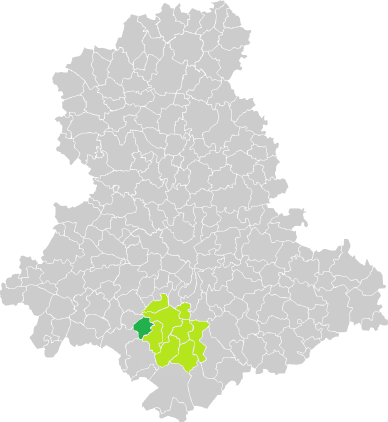 Carte de situation de la commune de Rilhac-Lastours (en vert foncé) dans le votre Canton (en vert clair) sur une carte des communes de la Haute-Vienne